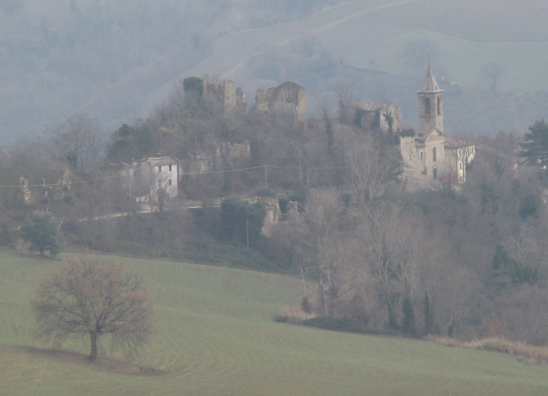 Panorama di Castelnuovo, frazione del comune di Auditore (PU).